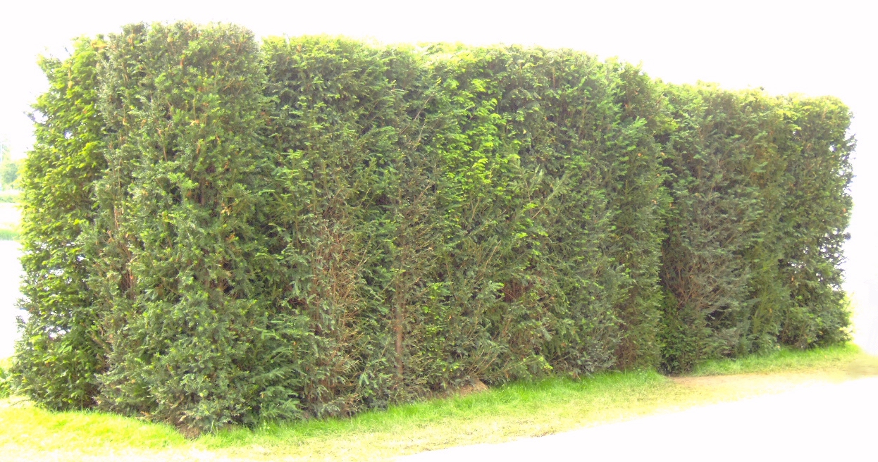 Rosemarie Trockel: Less Sauvage than Others (Weniger wild als andere) (2007) in Münster/Germany